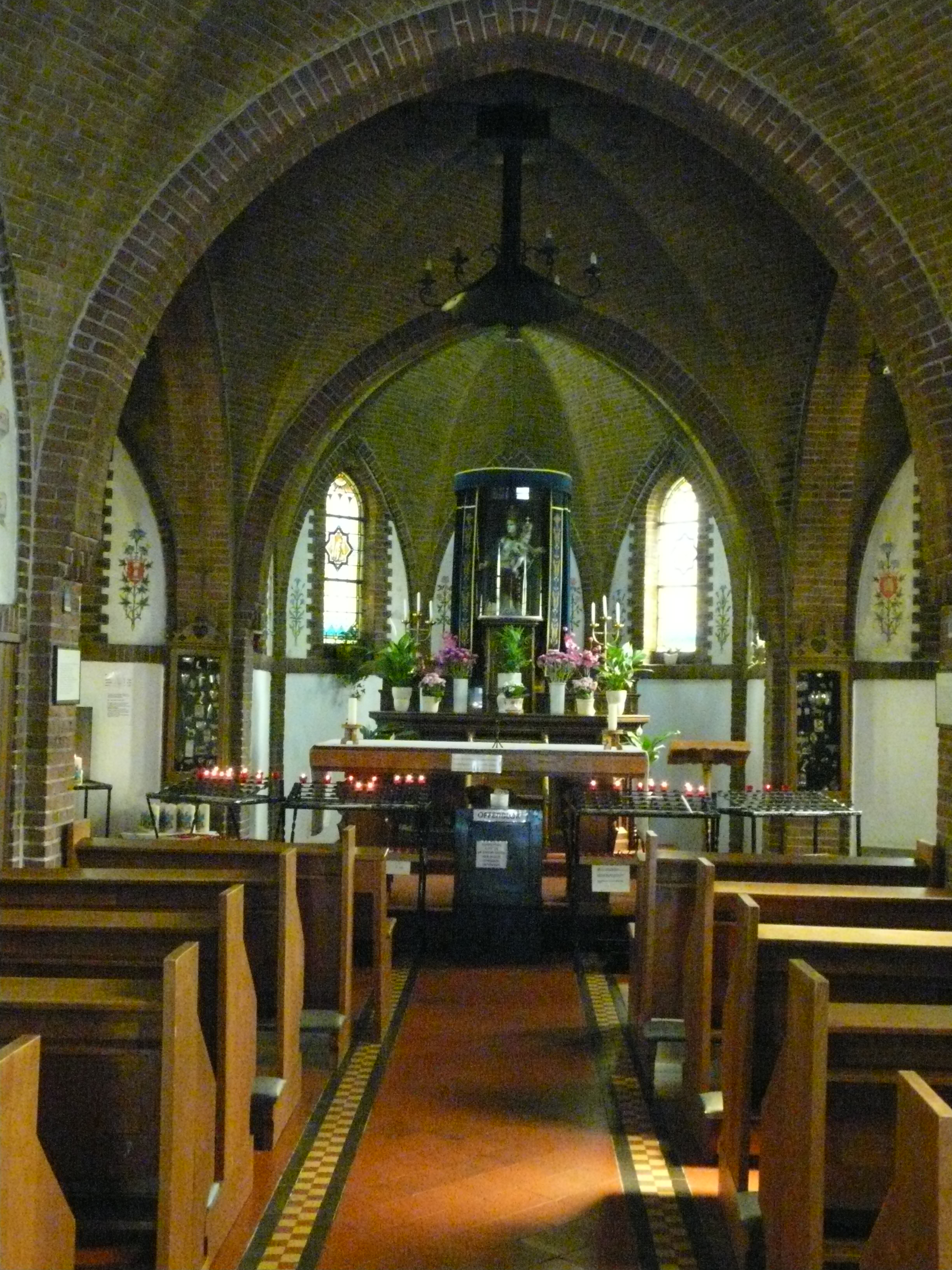 Zicht op een deel van het interieur van de O.L. Vrouw van Zegge kapel in Zegge